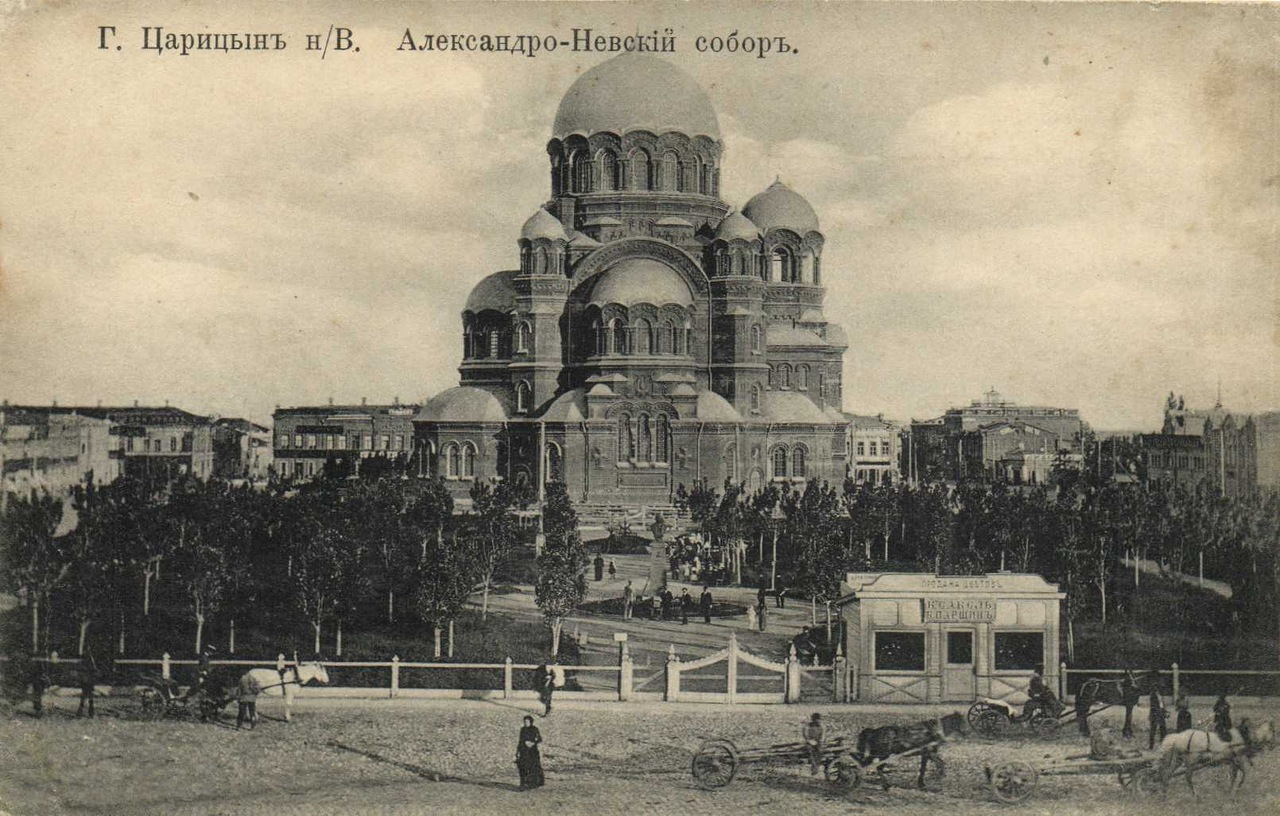 Город Царицын (Волгоград) конца ХIХ - начала ХХ века